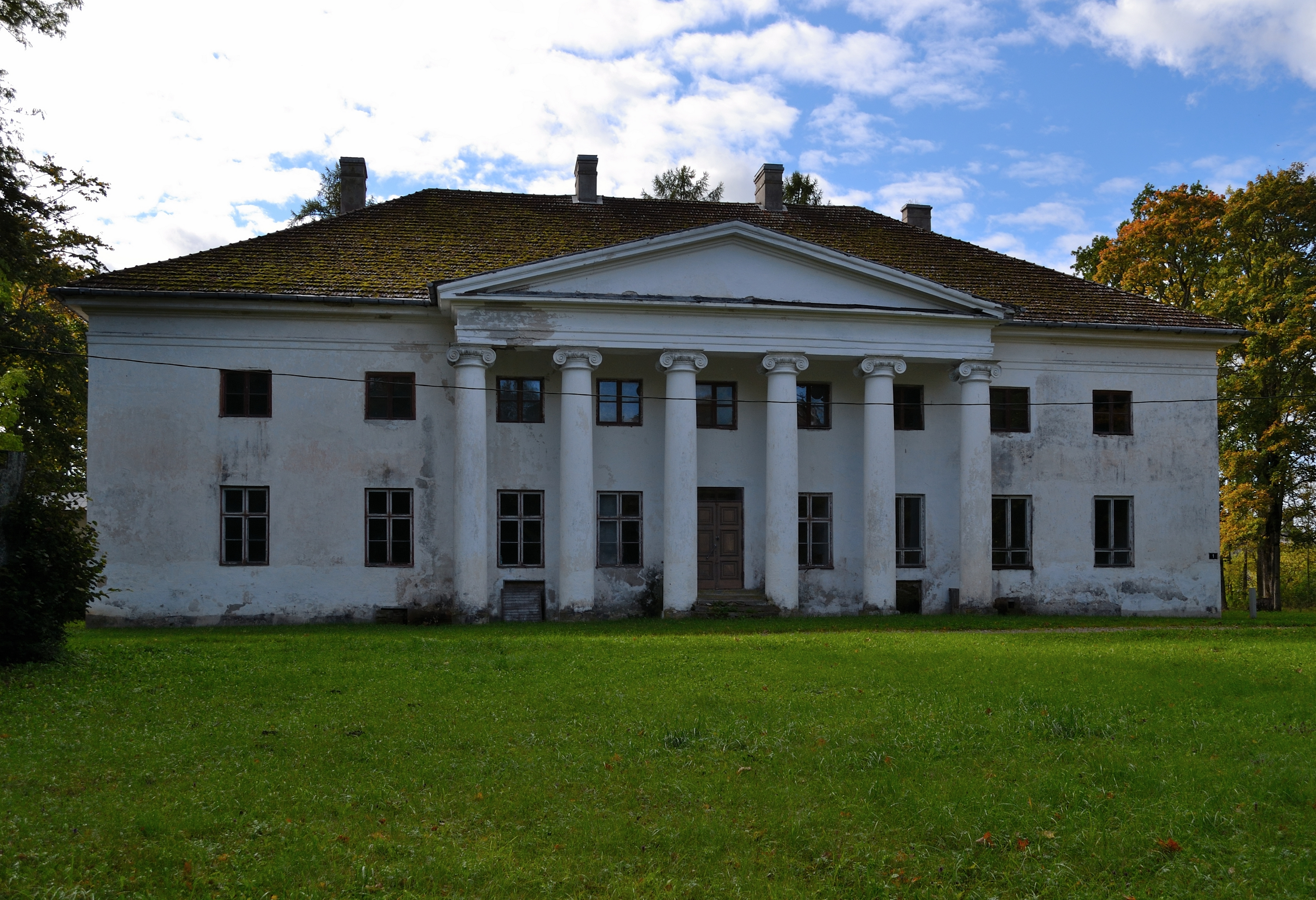 Härgla mõisa peahoone